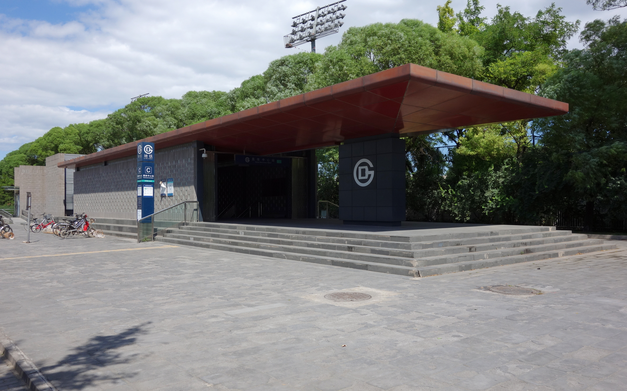 北京地铁8号线奥体中心站东南 (C) 出入口